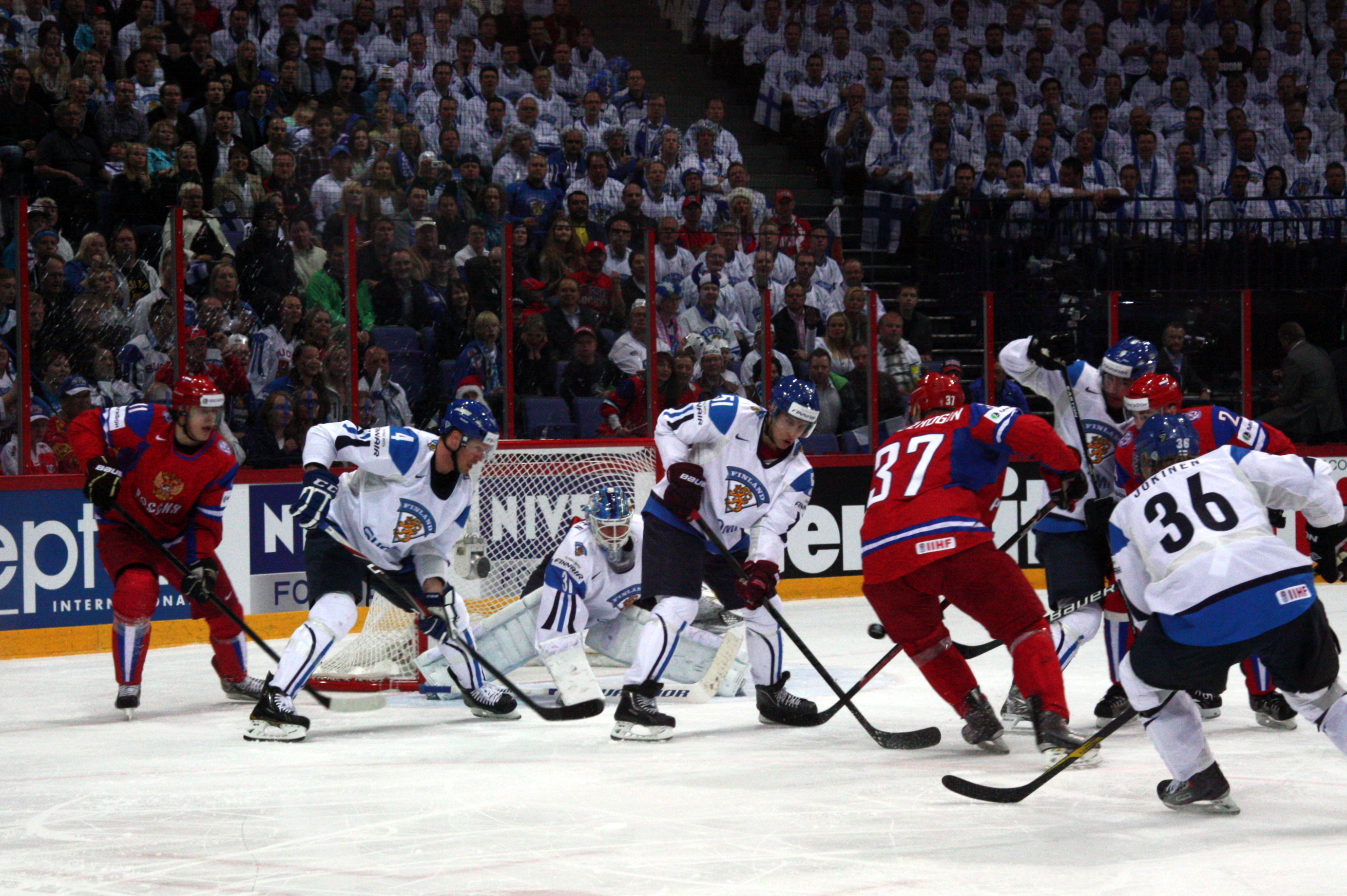 ЧМ 2012, Полуфинал, 19.05.2012, Финляндия-Россия, Хельсинки